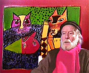 Portrait de Guillaume Cornelis van Beverloo